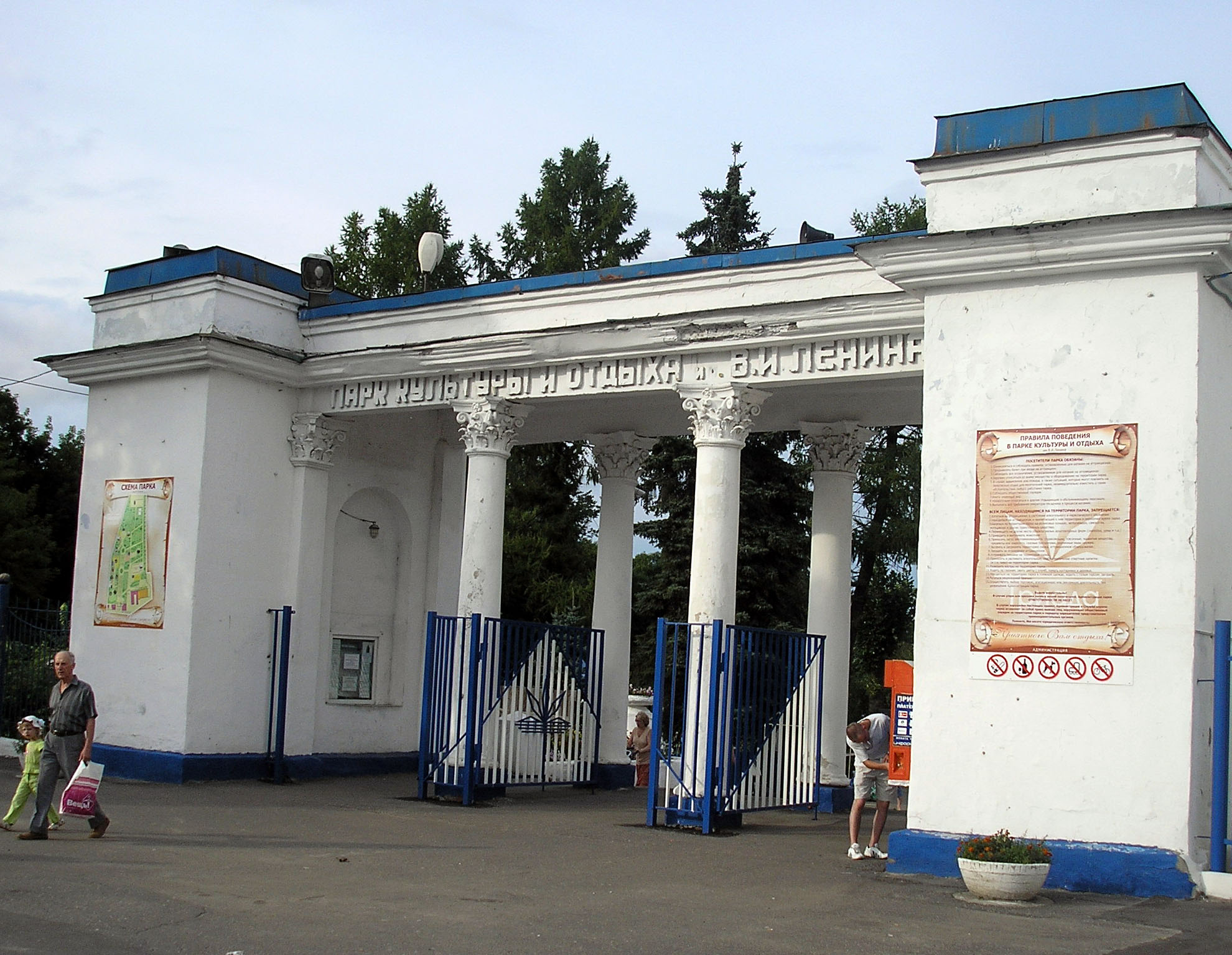 Вход в парк им.В.И.Ленина (архитектор Н.А.Беспалов), 2009